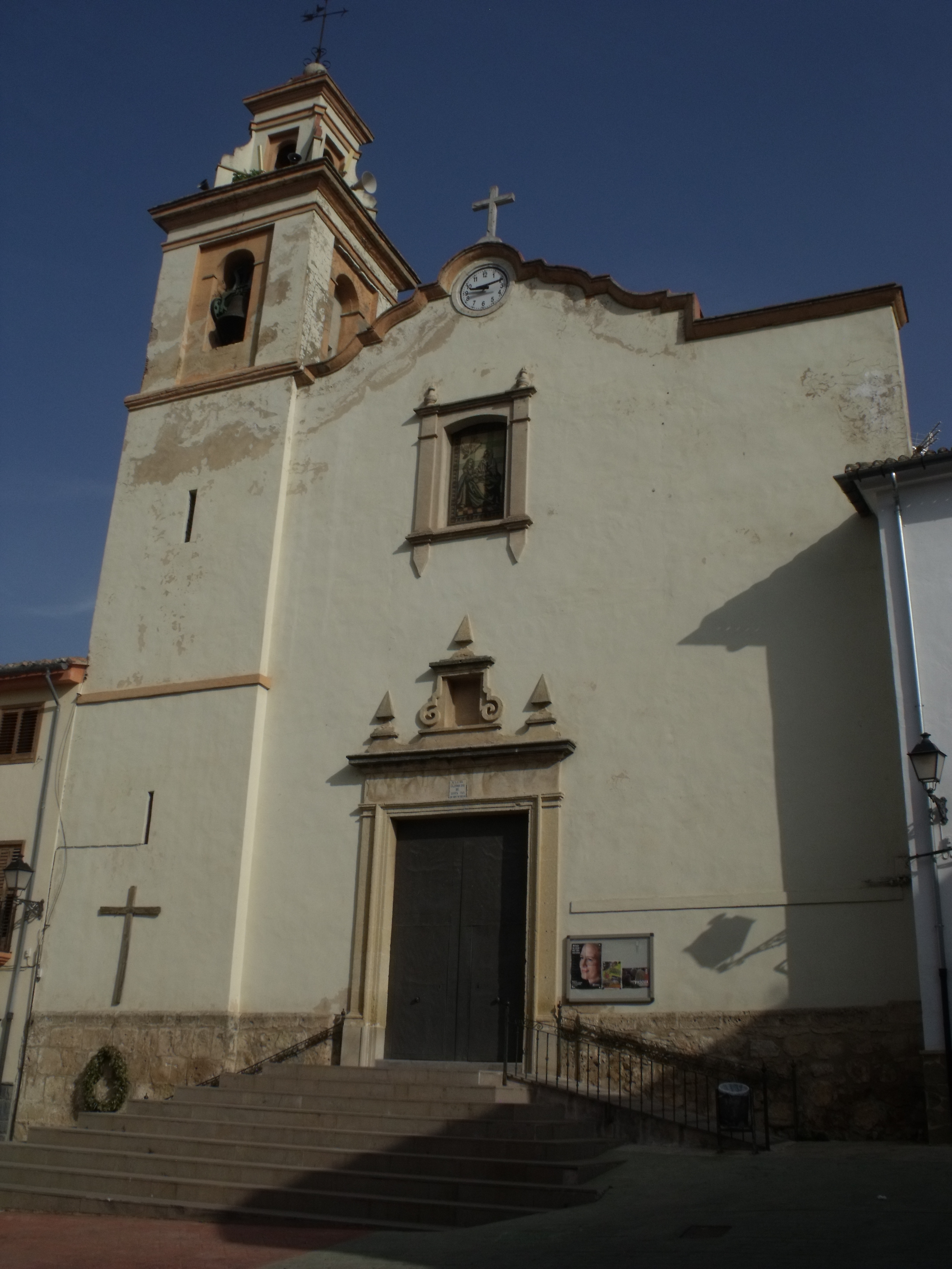 Montichelvo, Iglesia de Santa Ana